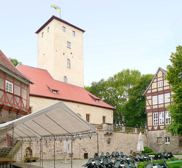 Innenhof Burg Warberg Foto aufgenommen von Benutzer Benutzer:Axel Hindemith, Juni 2006